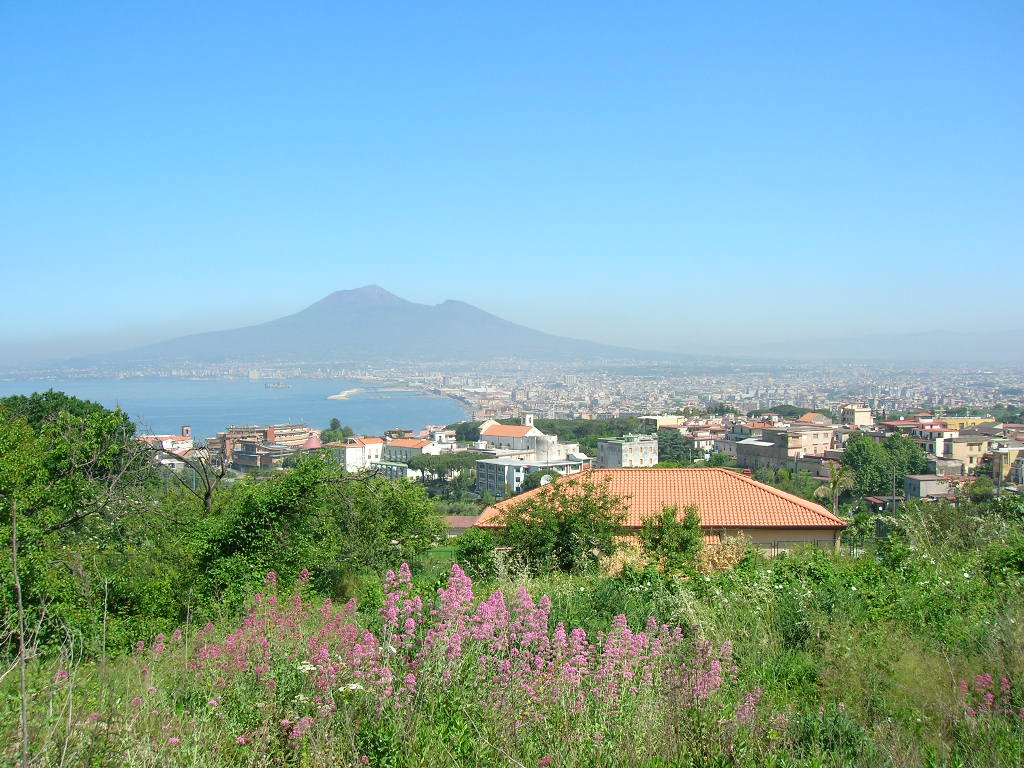 Sicilianu: Castiddammari di Stabbia.